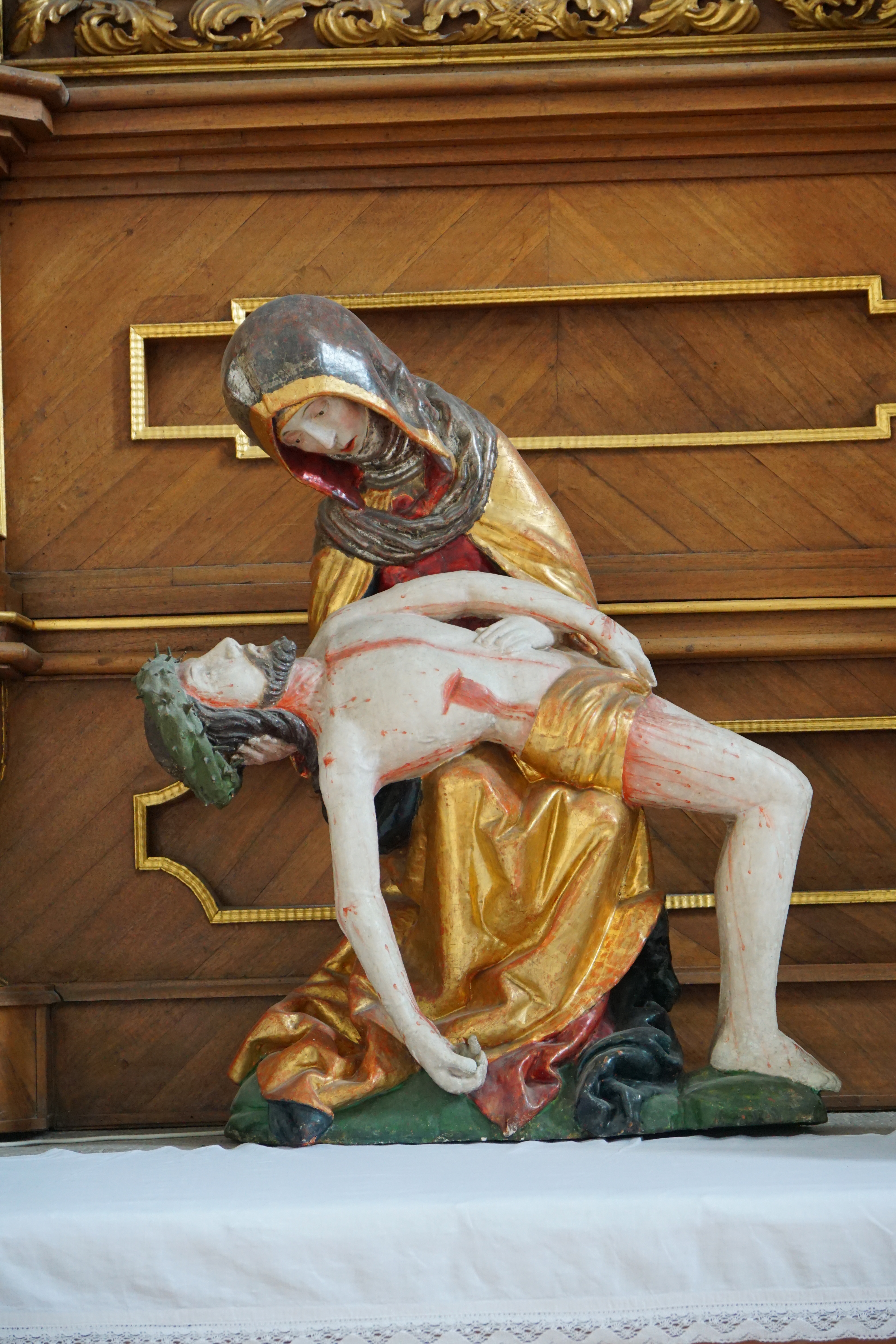 Klosterkirche des Klosters Kirchberg.